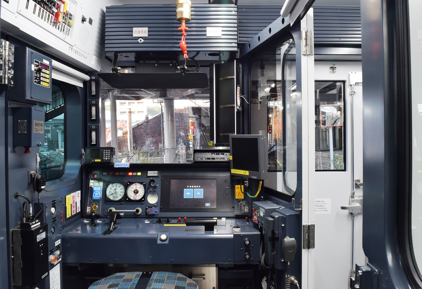 クモハ818-4の運転台です